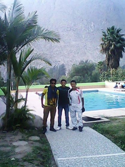 lima - peru